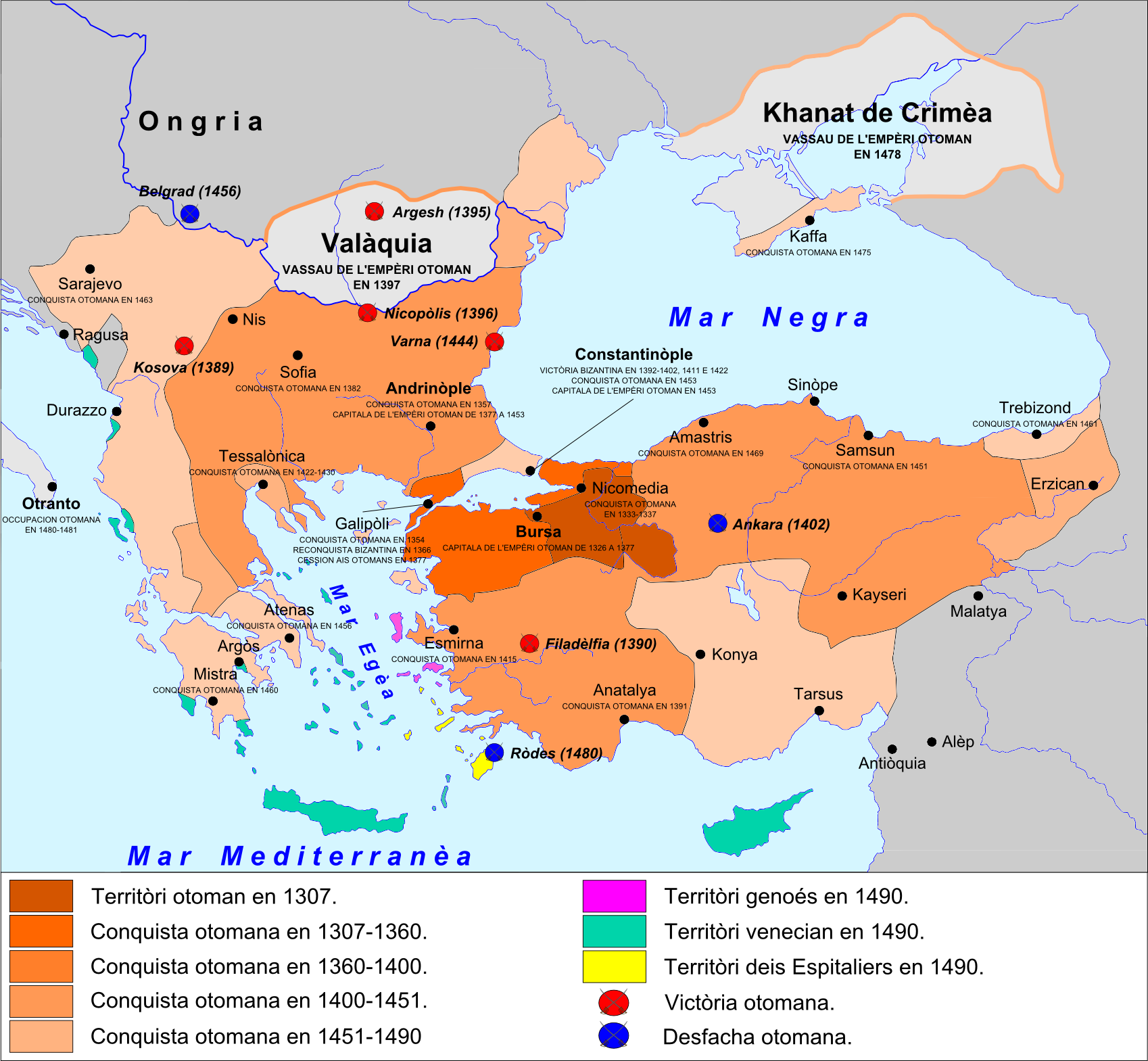 Expansion territòriala de l'Empèri Otoman de 1307 a 1490.